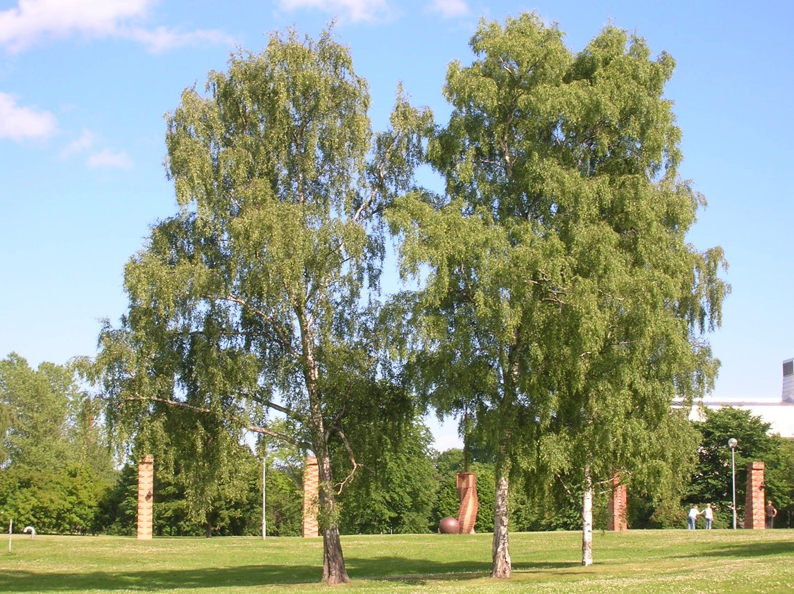 Betula pendula, Birch tree at Stockholm university, Stockholm, Sweden.